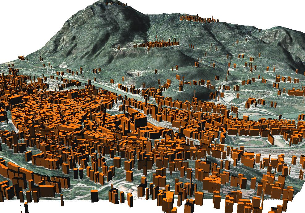 Screenshot GRASS